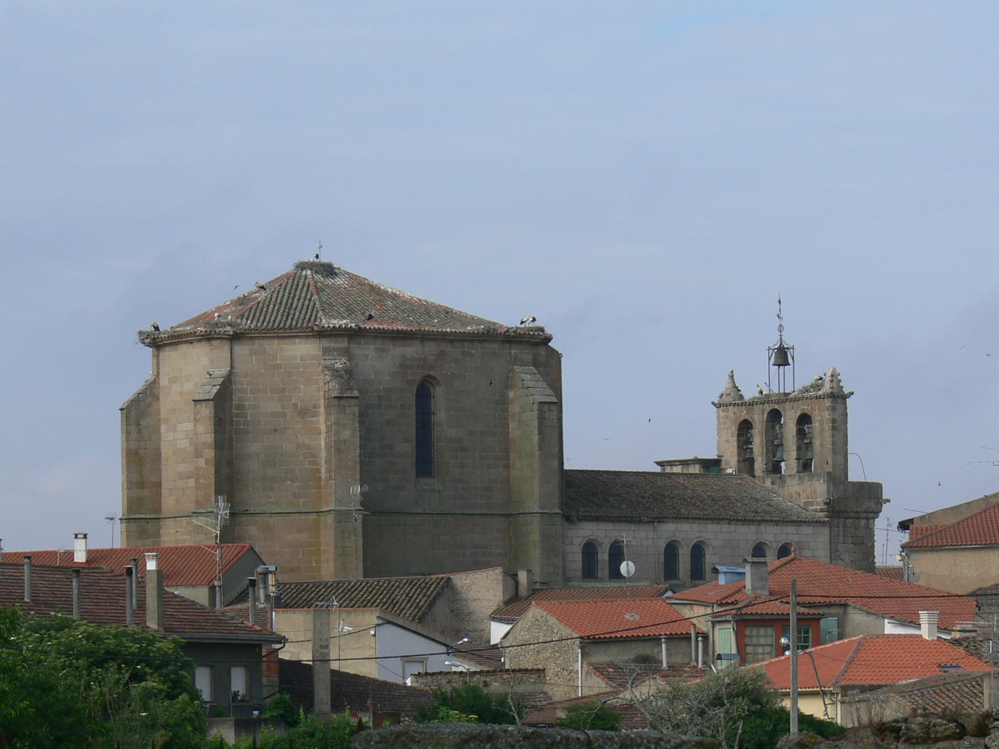 Iglesia de Villavieja de Yeltes (Salamanca, España)